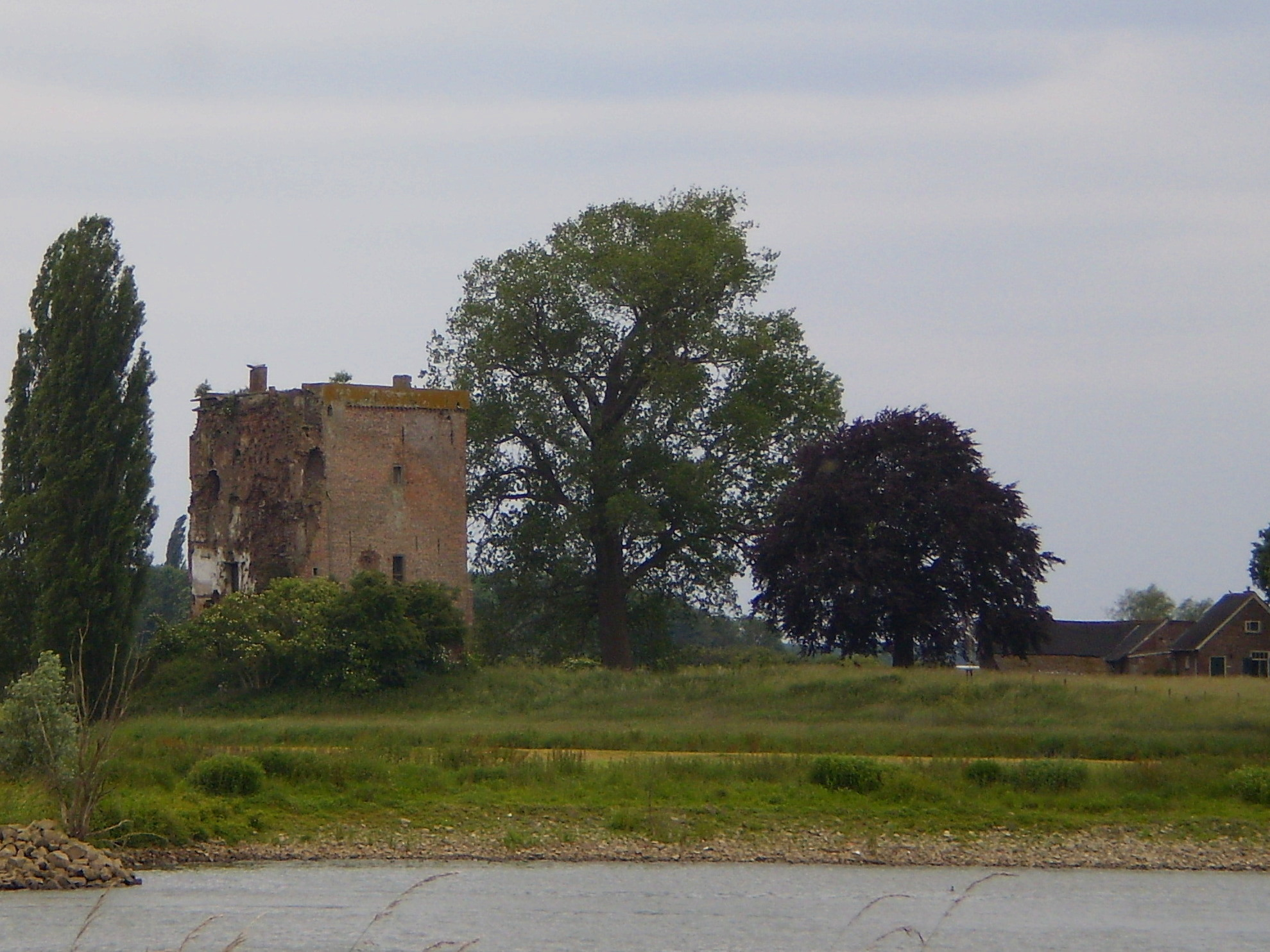 Slot Nijenbeek, Gietelo NL